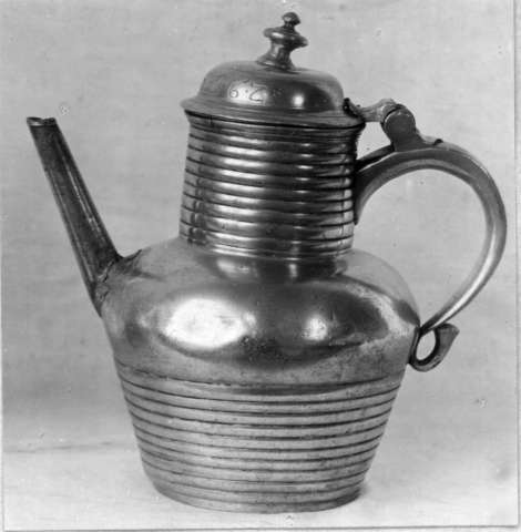 Tutekanne i tinn, antakelig fra 1700-årene, innkommet til Norsk Folkemuseum fra Nord-Aurdal i Oppland. Høyde 18,5 cm. Foto Norsk Folkemuseum, NF.1897-0510.